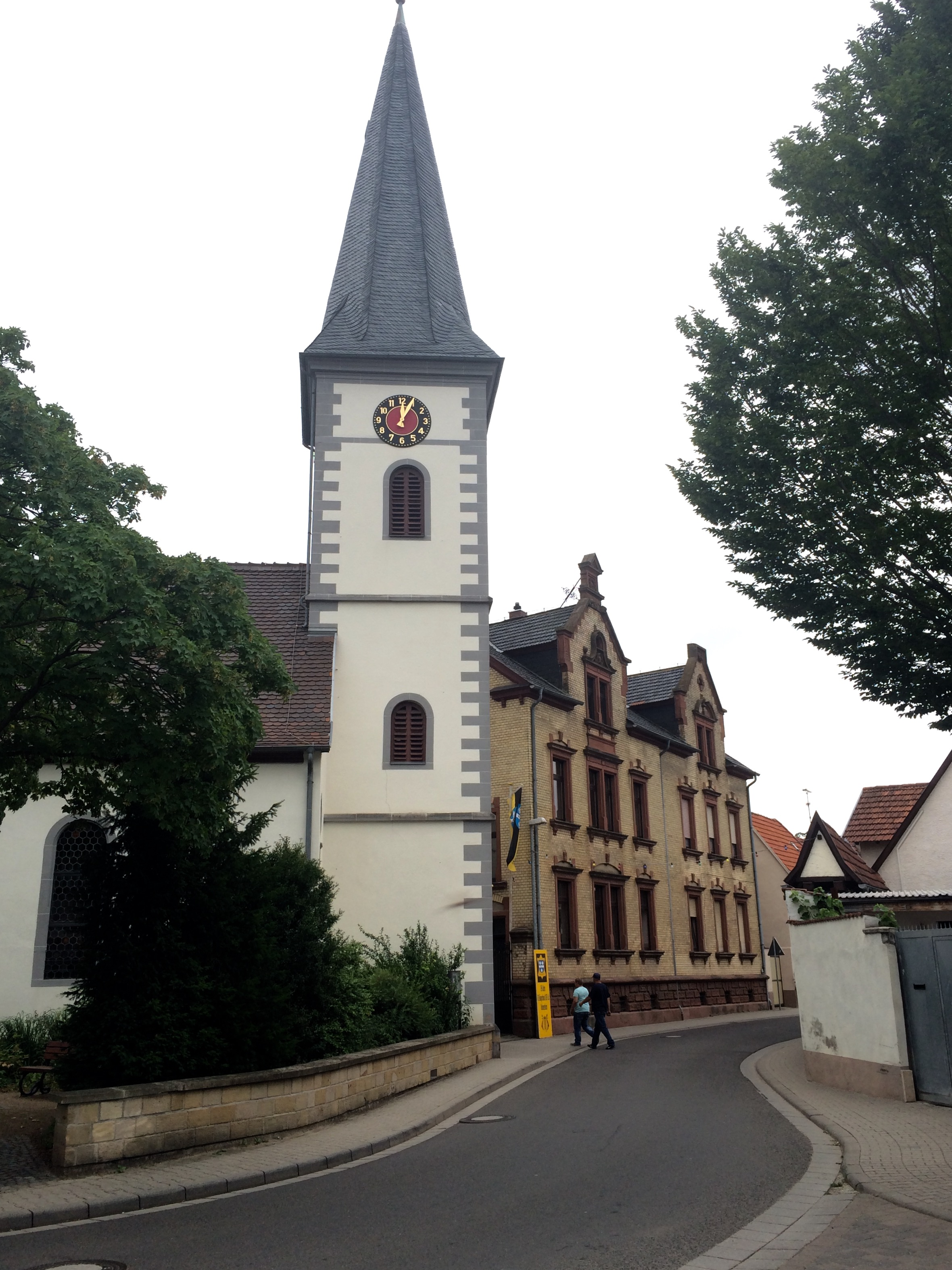 Mauritiuskirche Heimersheim